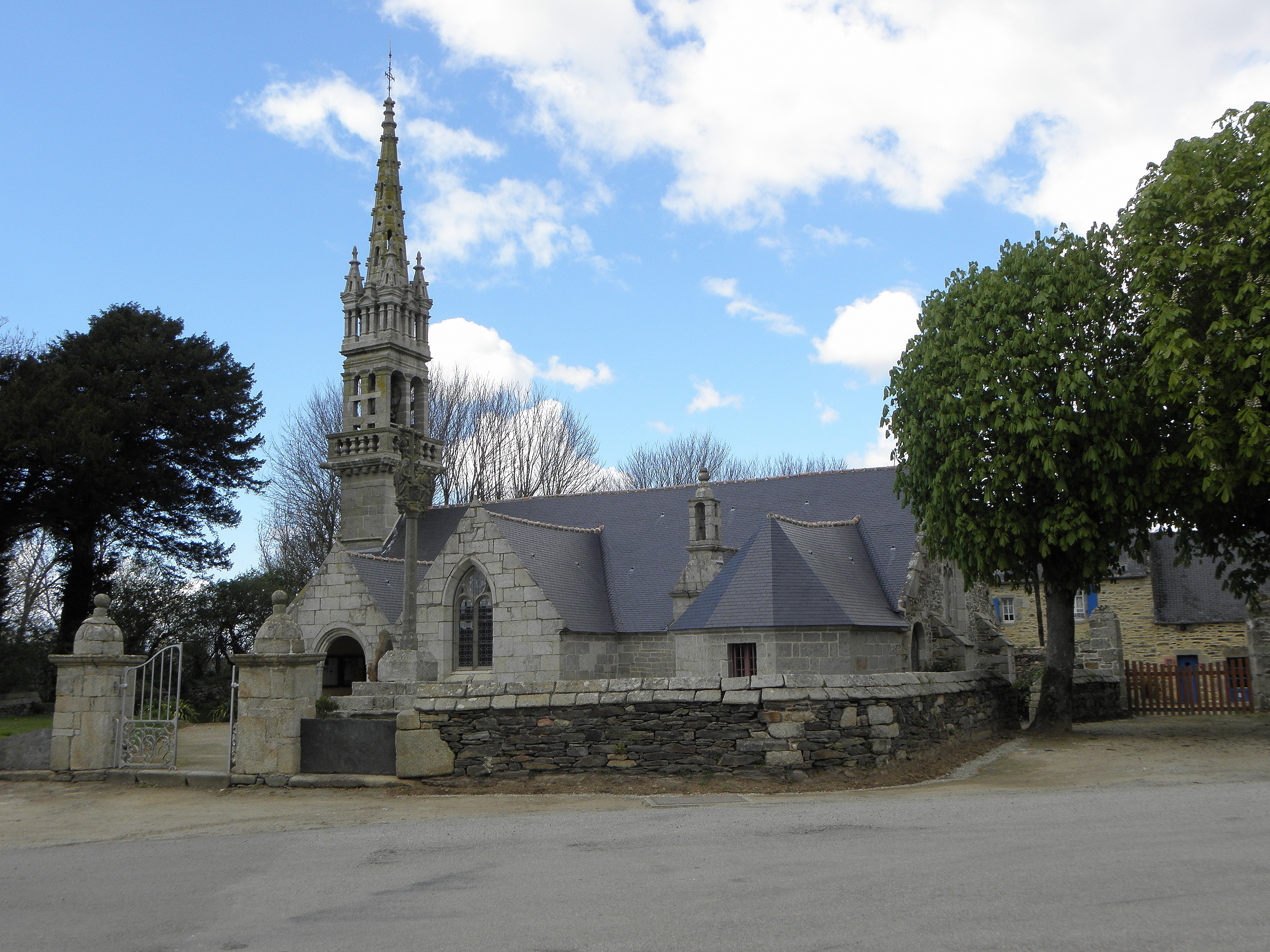 Vue méridionale de l'église Saint-Méen de Ploéven (29).